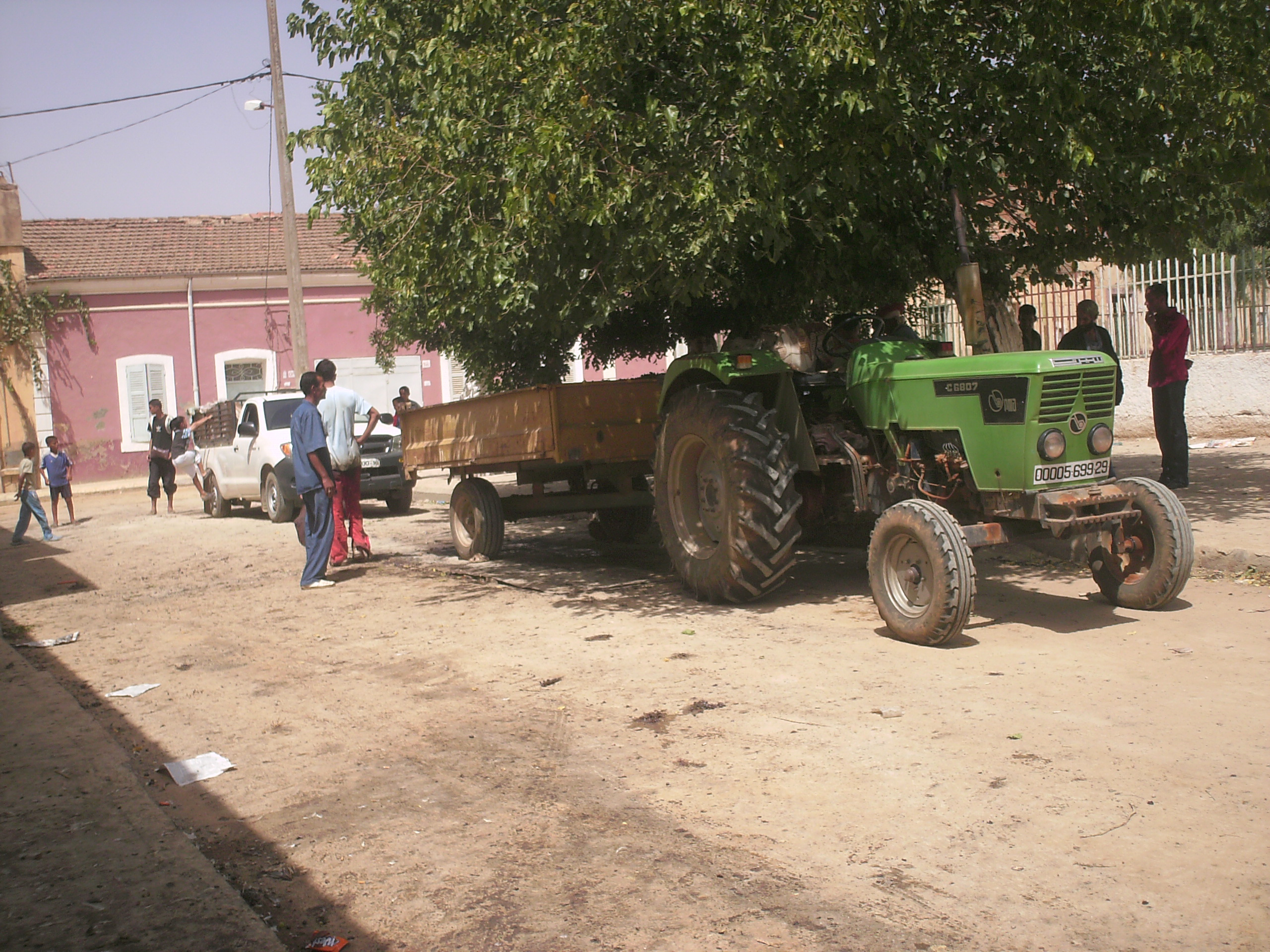 Devant la cave de L'ONCV, Algérie, tracteur PMA C 6807 (license Deutz)